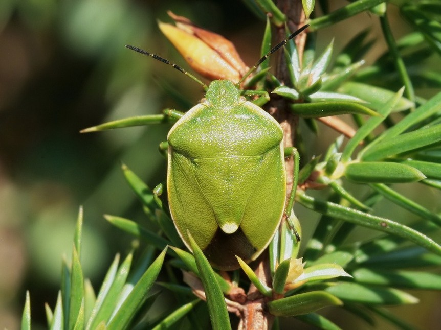 Chlorochroa juniperina op jeneverbes